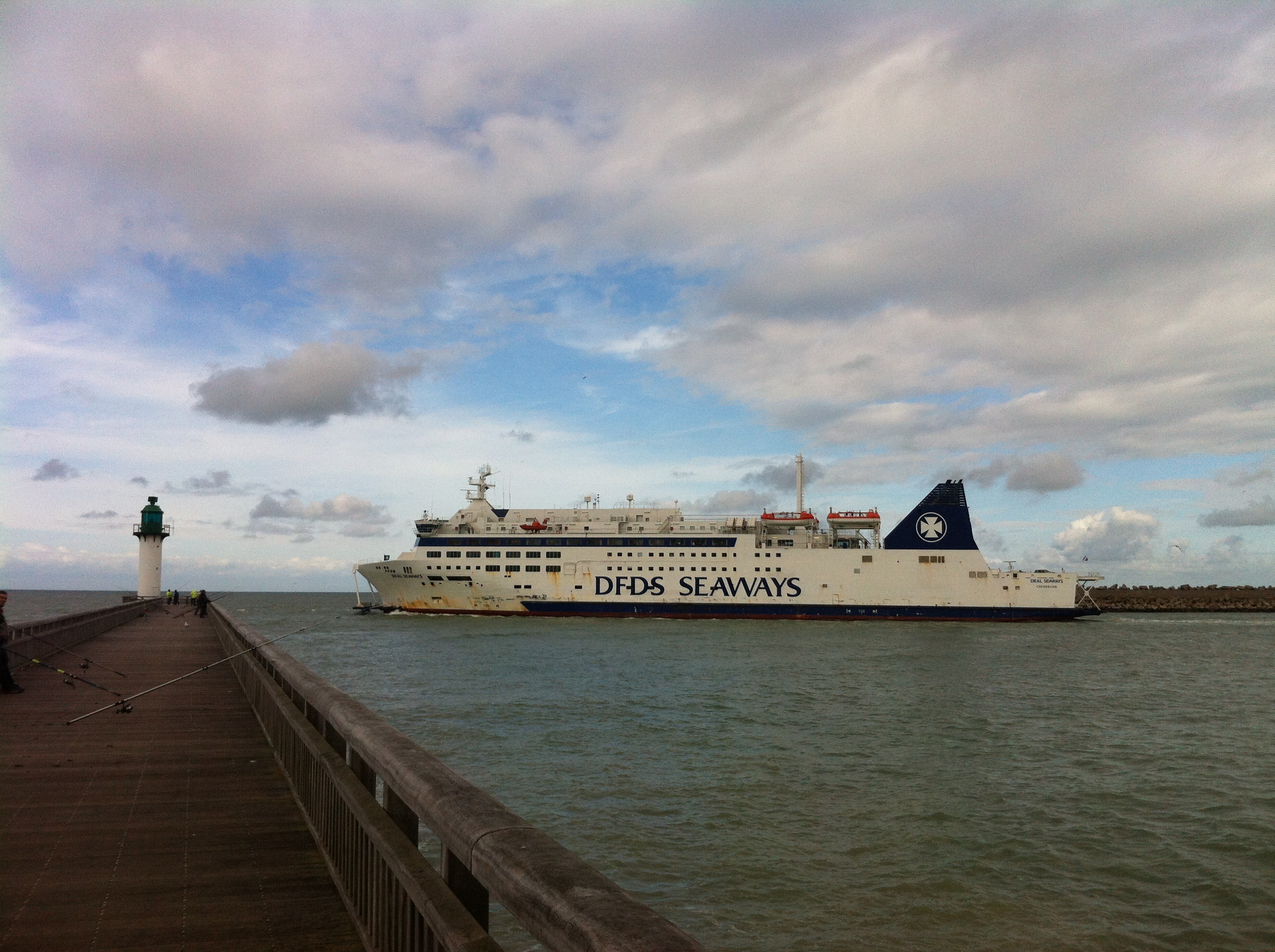 Le Deal Seaways sous DFDS Seaways, dernières rotations avant de redevenir le Barfleur pour Brittany Ferries.